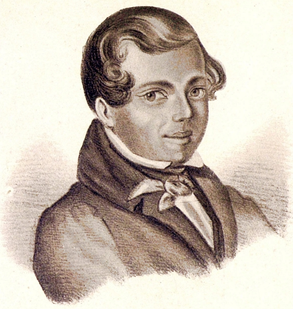 Кольцов, Алексей Васильевич